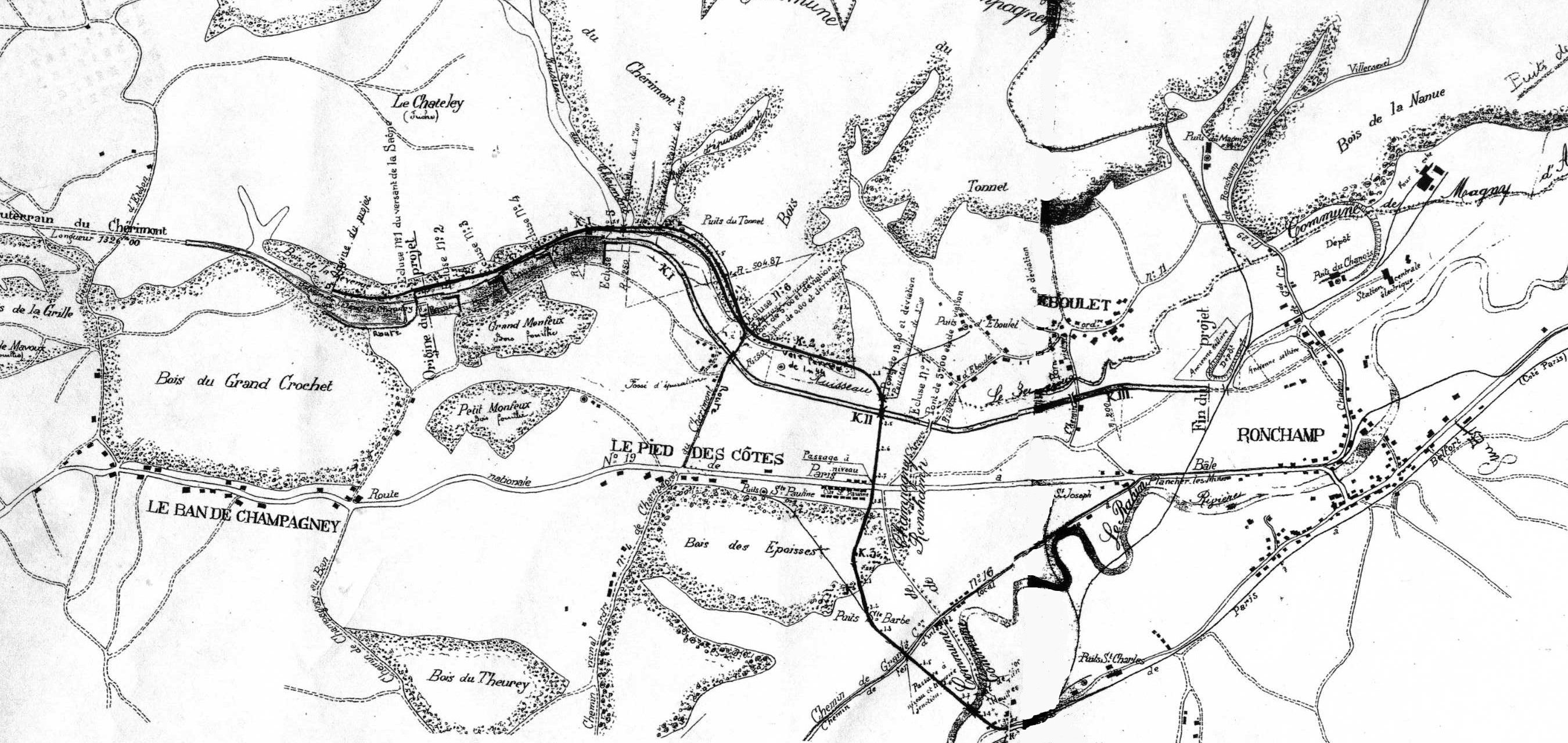 Carte du réseau ferré des houillères de Ronchamp et du projet de port et canal.